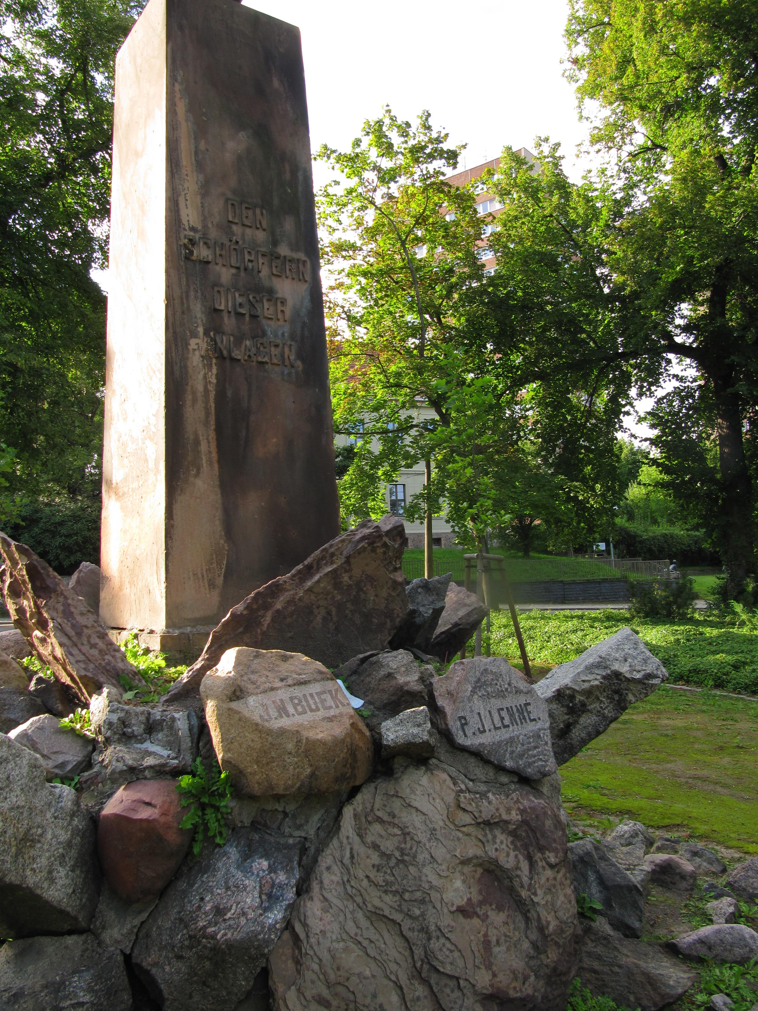 Schöpferdenkmal im Lennepark in Frankfurt (Oder)